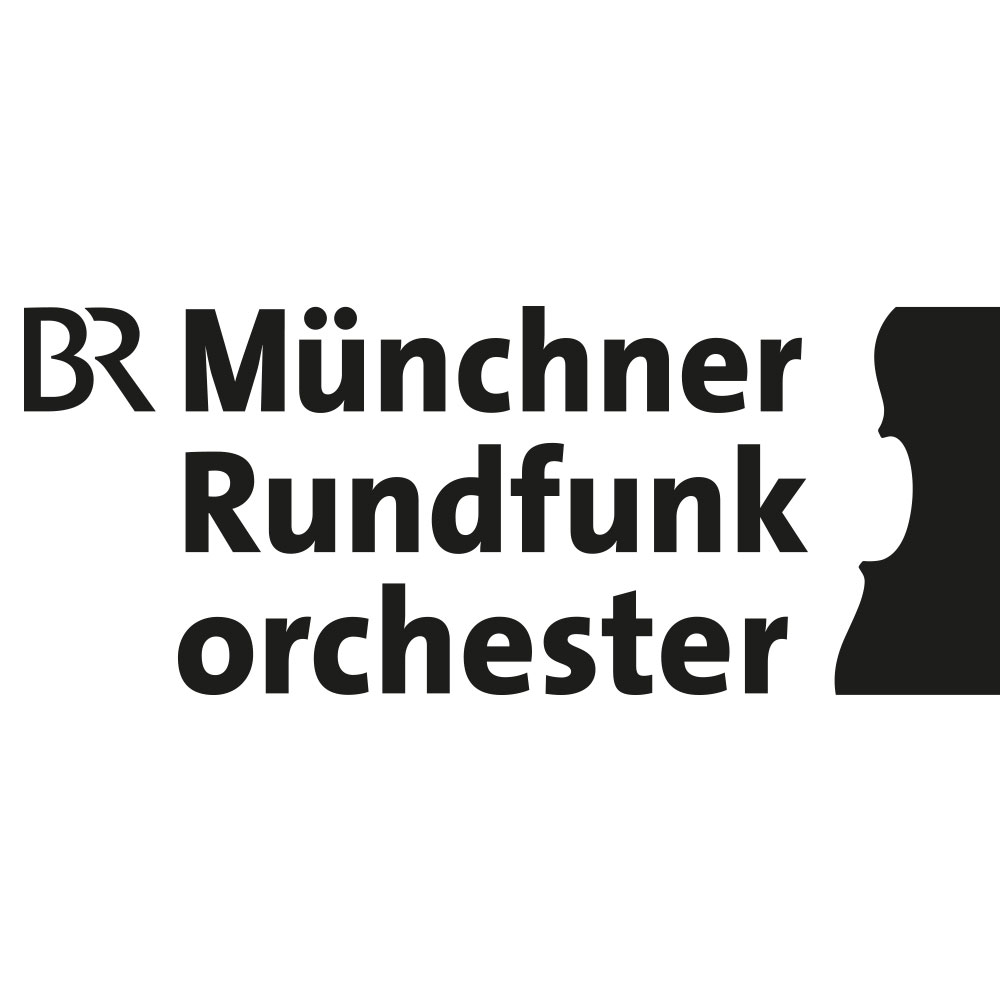 Logo des Münchner Rundfunkorchesters 2017